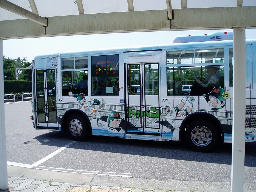 新潟市観光循環バス「ドカベン号」。